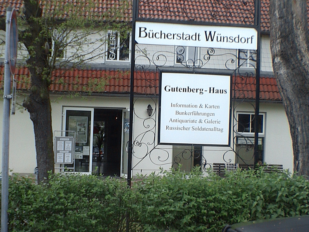 Bücherstadt Wünsdorf